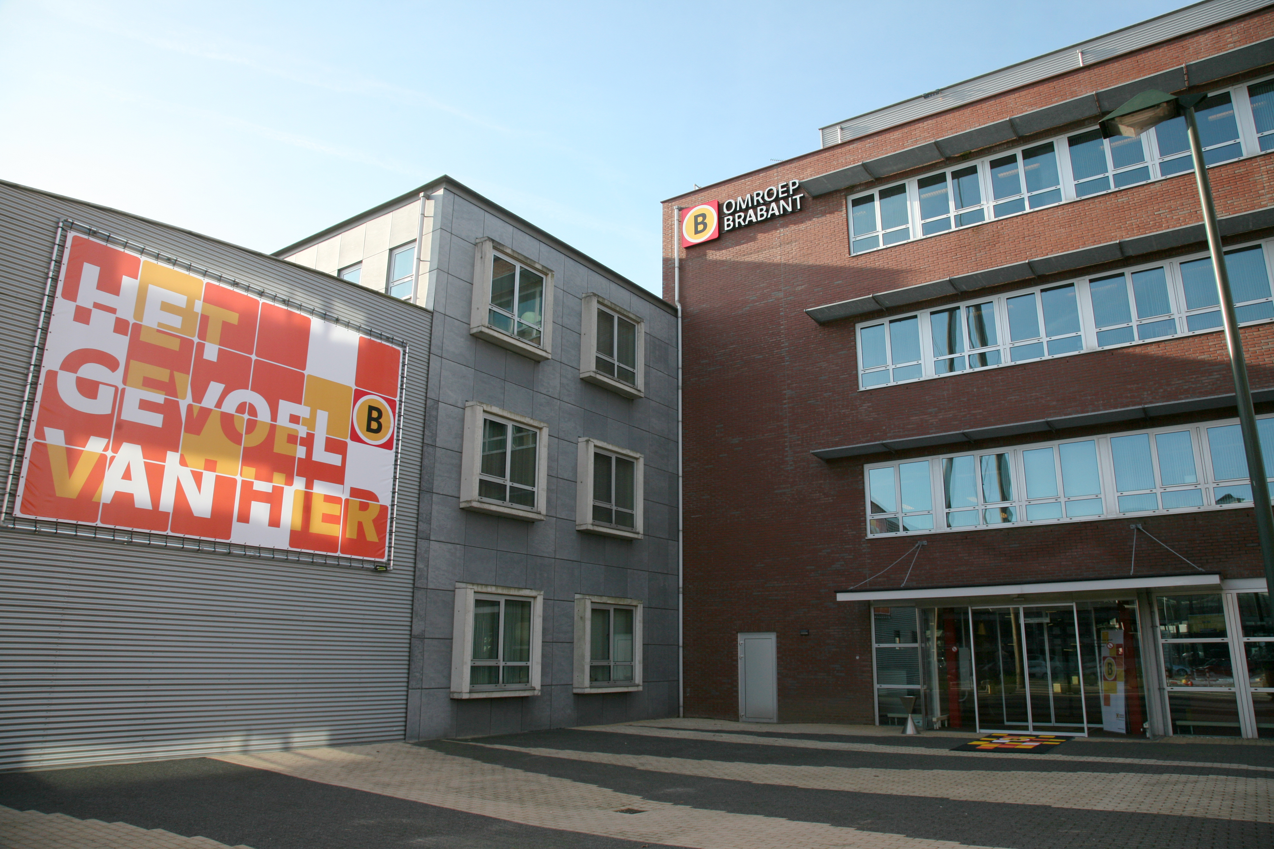 Eigen foto van het gebouw van Omroep Brabant